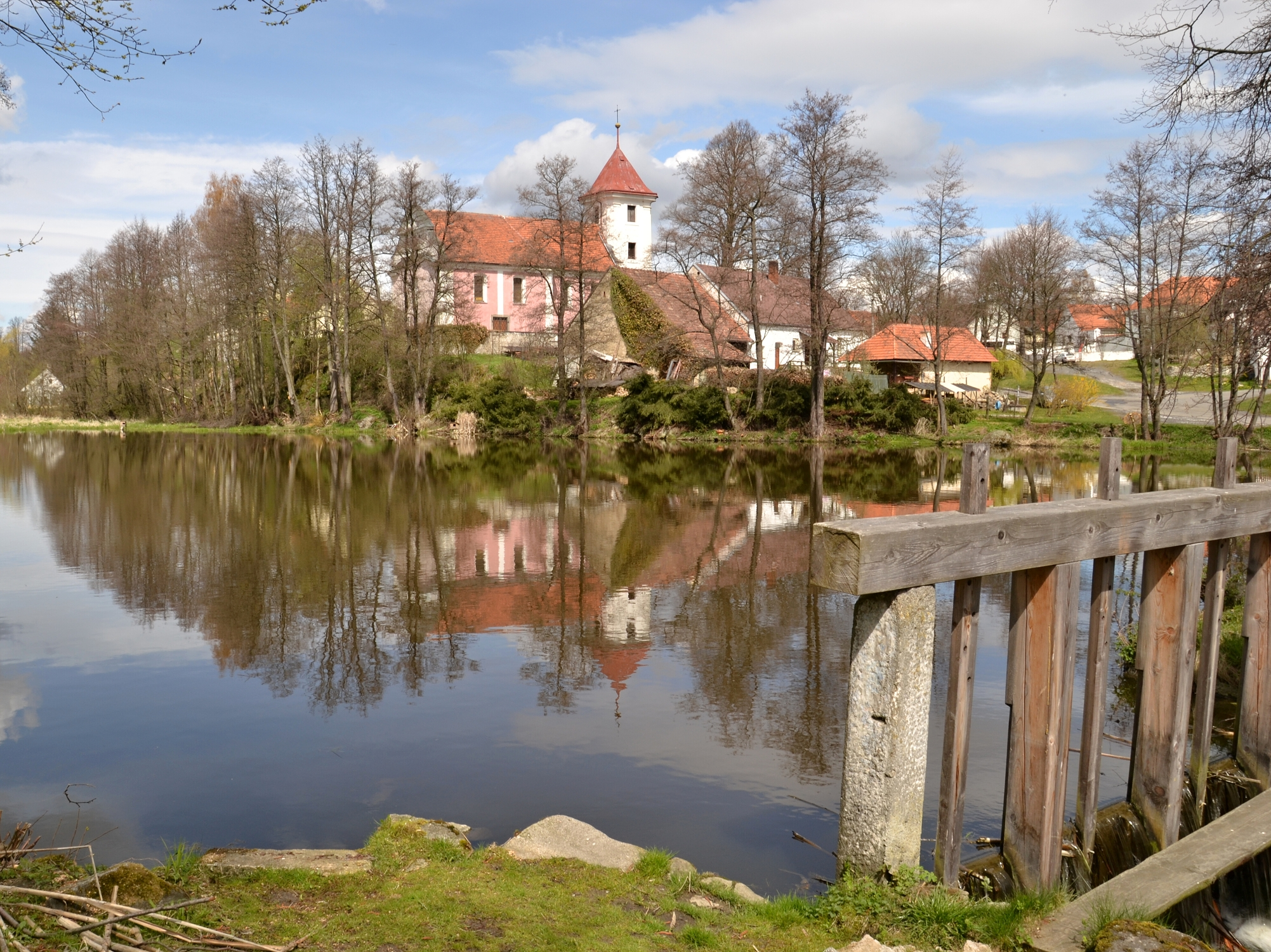 Kostel sv. Filipa a Jakuba